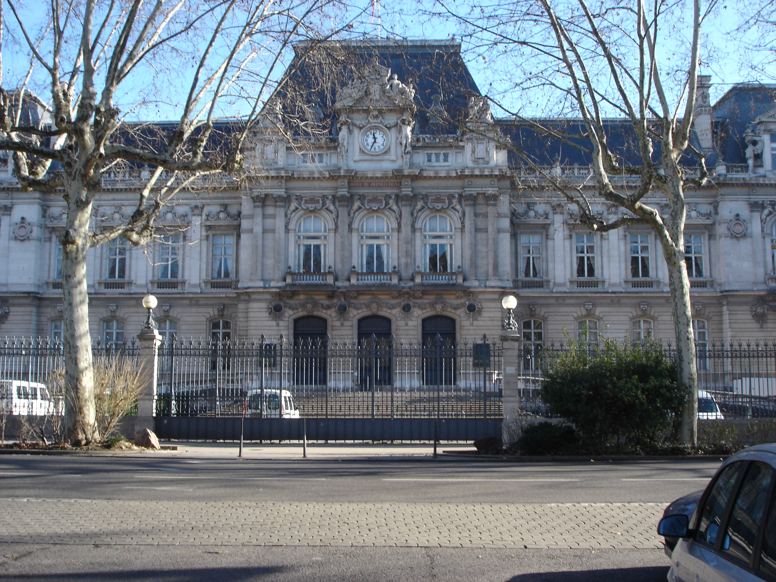 Façade de l'Hôtel de préfecture du Rhône